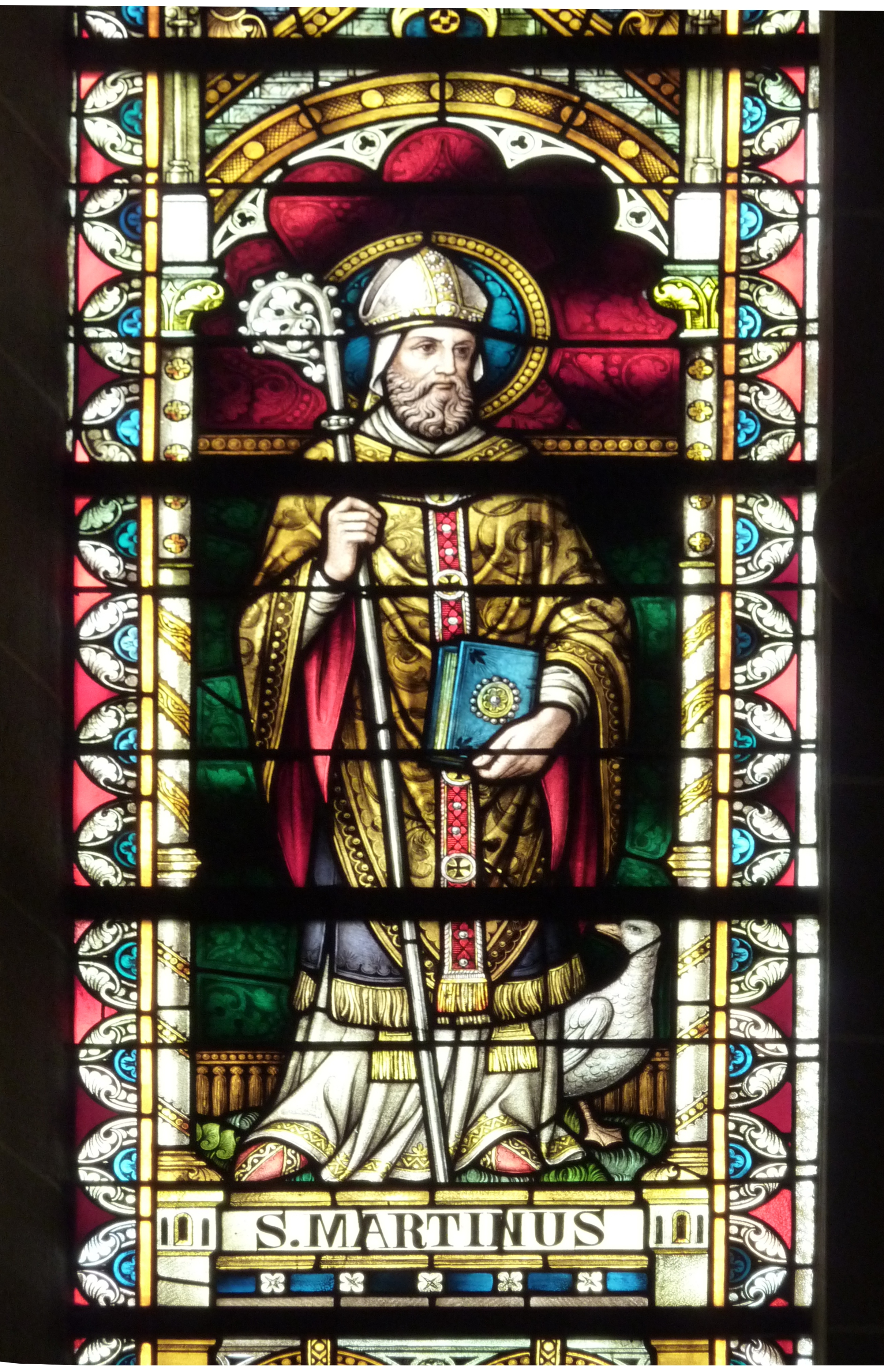 Kirche St. Martin in Bassenheim, Glasfenster mit der Darstellung des Heiligen Martin von Tours